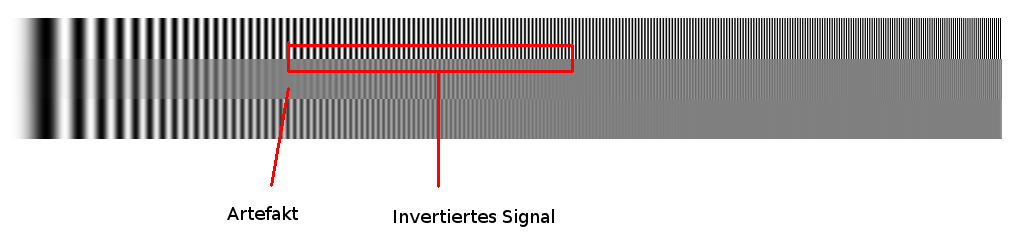 Als Grauwertbild dargestellter Frequenzsweep bis zur Nyquist-Frequenz (oben). Darunter die mit einem einfachen gleitenden Mittelwert sechster Ordnung geglättete Variante. Zuunterst eine mit einem Binomialfilter getiefpasste Version (Filterkoeffizienten: 1/64 * [1 6 15 20 15 6 1])